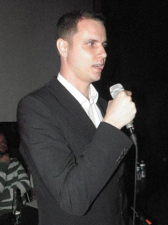 Václav Pištora pořádá veřejnou debatu s názvem Hazard v Ústí nad Labem.